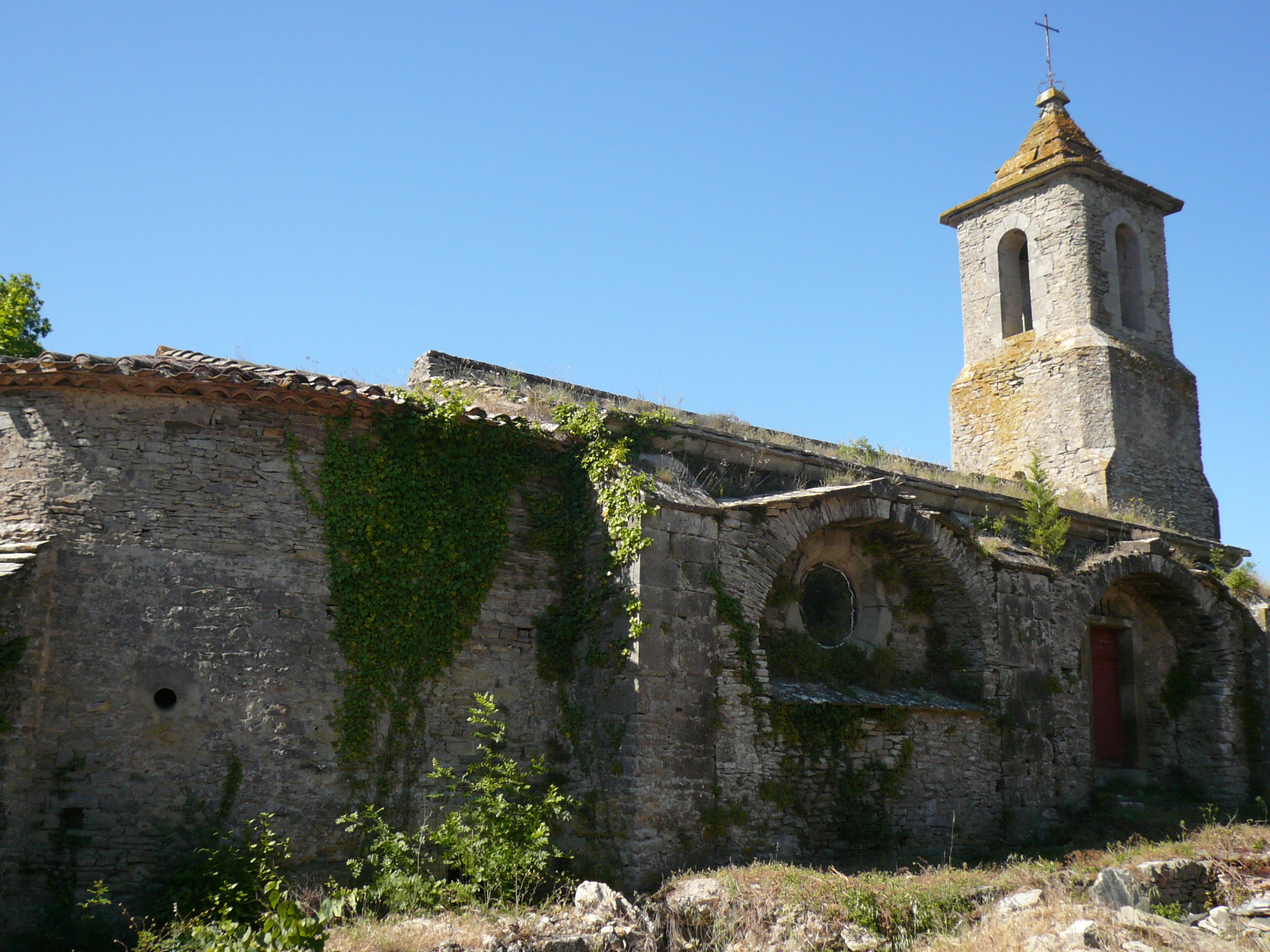 Eglise Saint-Pierre-es-Liens à Villarlong (et non Notre-Dame-de-la-Lauze) à Villarzel-Cabardès (Aude)